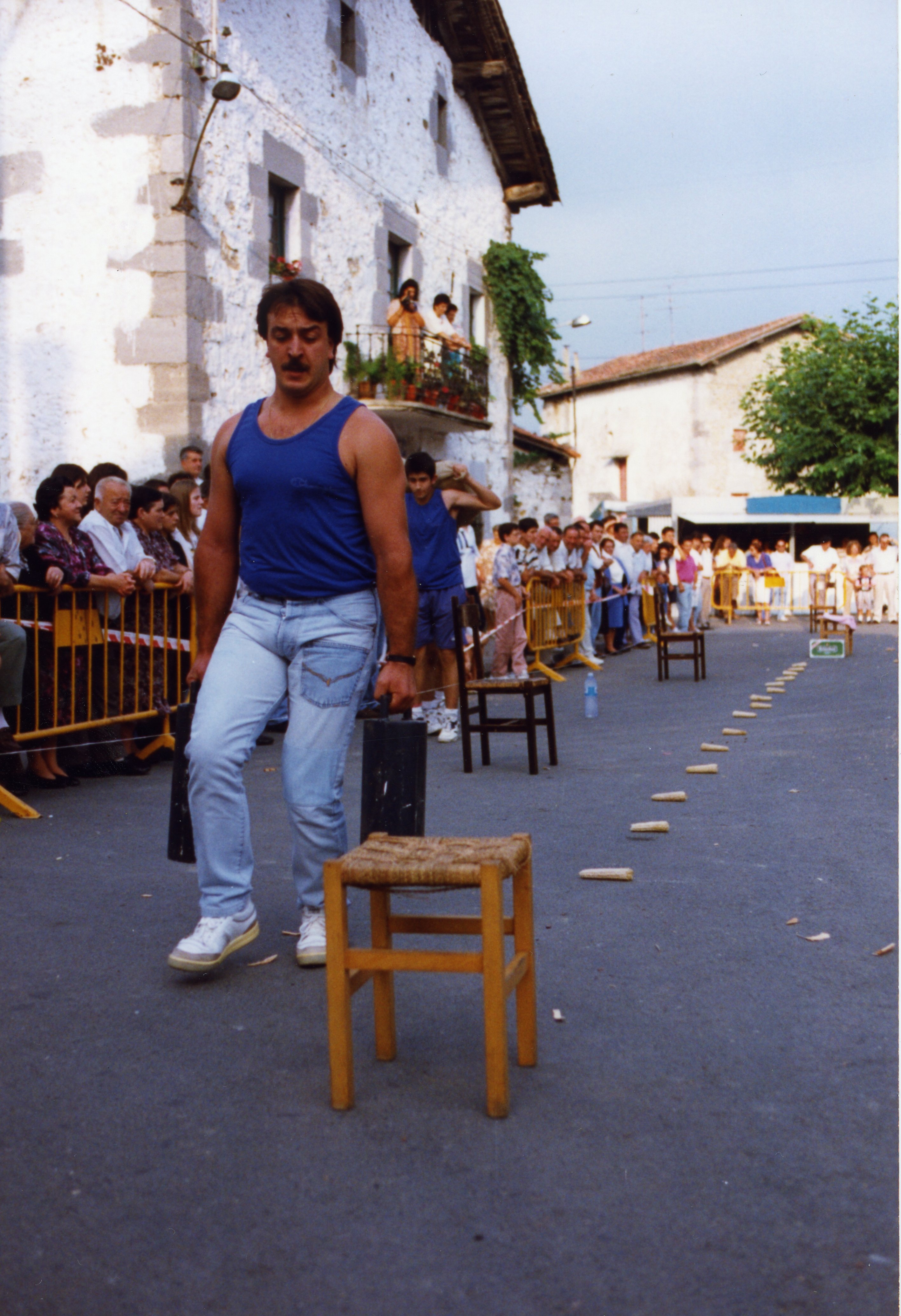 Andramari jaiak. Aiurri 19 zbk. 3. orr.